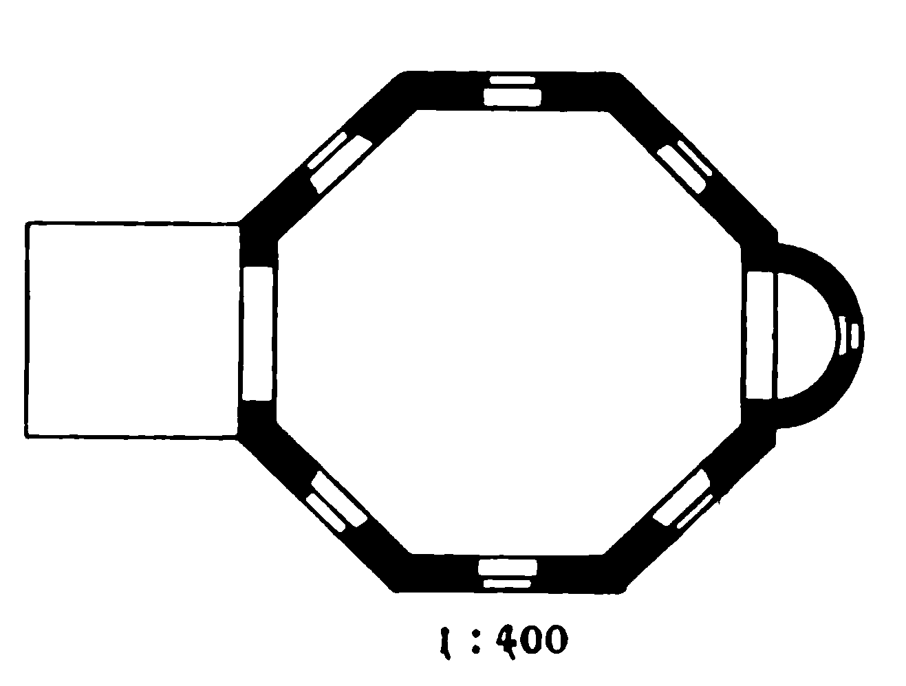 Grundriss der Johanniskirche in Vlotho